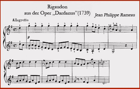 Jean-Pholippe Rameau Rigaudon aus der Oper "Dardanus" 1735 Klavier